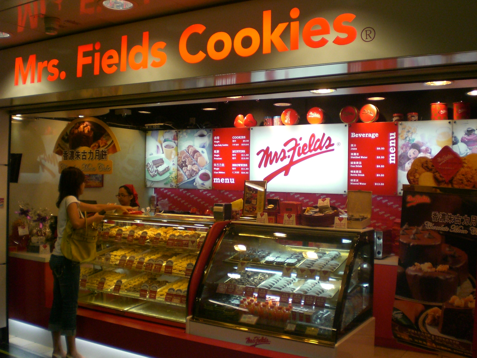 Mrs. Fields, 史物斯太太曲奇餅店, 香港地鐵, 灣仔站.